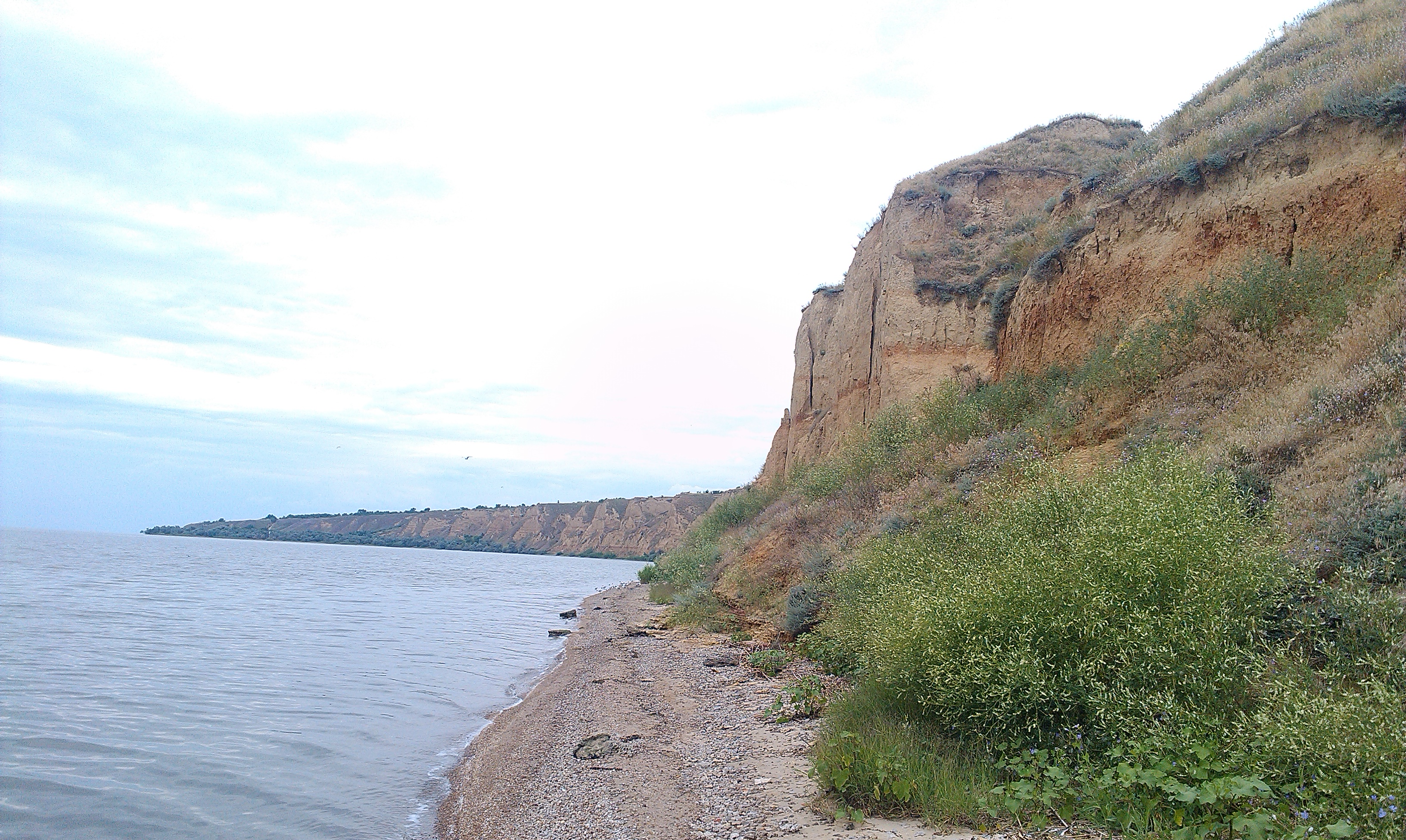 Культурний шар просто обвалюється у воду.